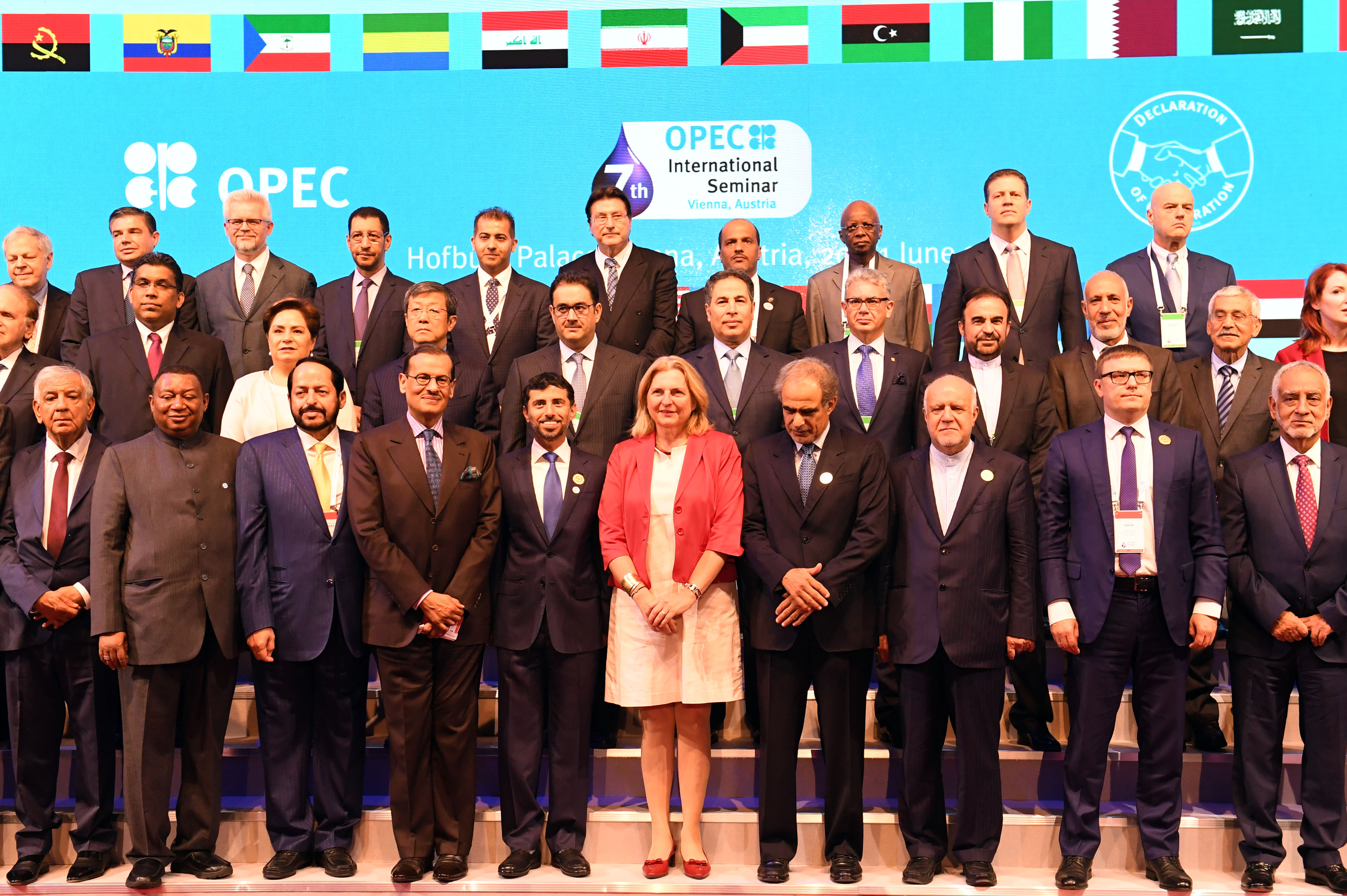 Wien am 20. Juni 2018 Außenministerin Karin Kneissl betonte bei der Eröffnung des 7. Internationalen OPECSeminar zum Thema „Energy Cooperation“ die Rolle Wiens als internationaler EnergyHub. Um die Energiewende herbeizuführen, braucht es langfristige Planungen & sofort umsetzbare Maßnahmen. Foto: Mahmoud